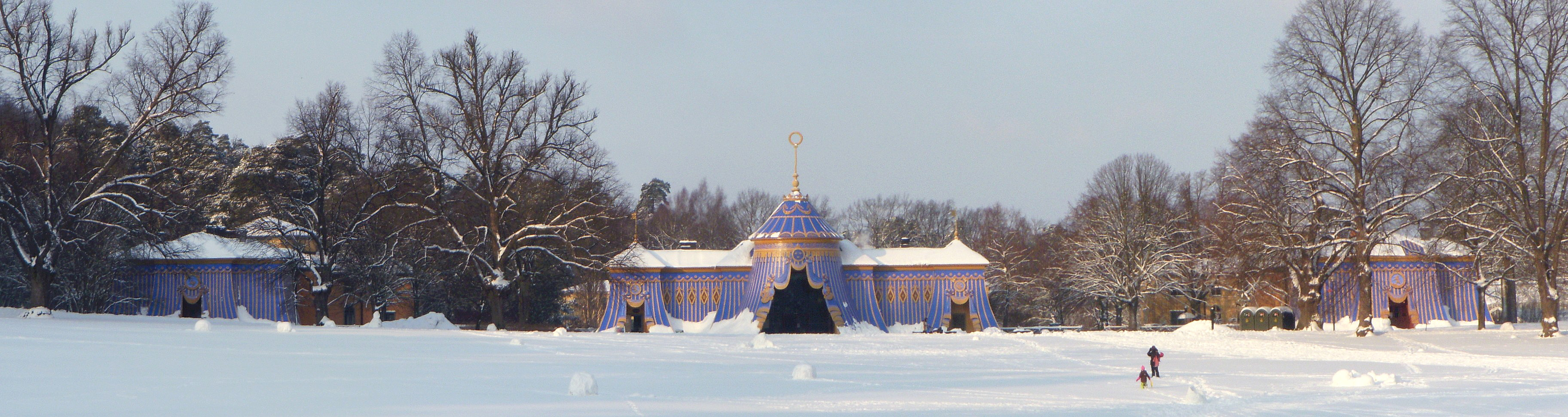 Panorama sammansatt av fem delbilder visande alla tre koppartälten i Hagaparken efter ommålningen 2009